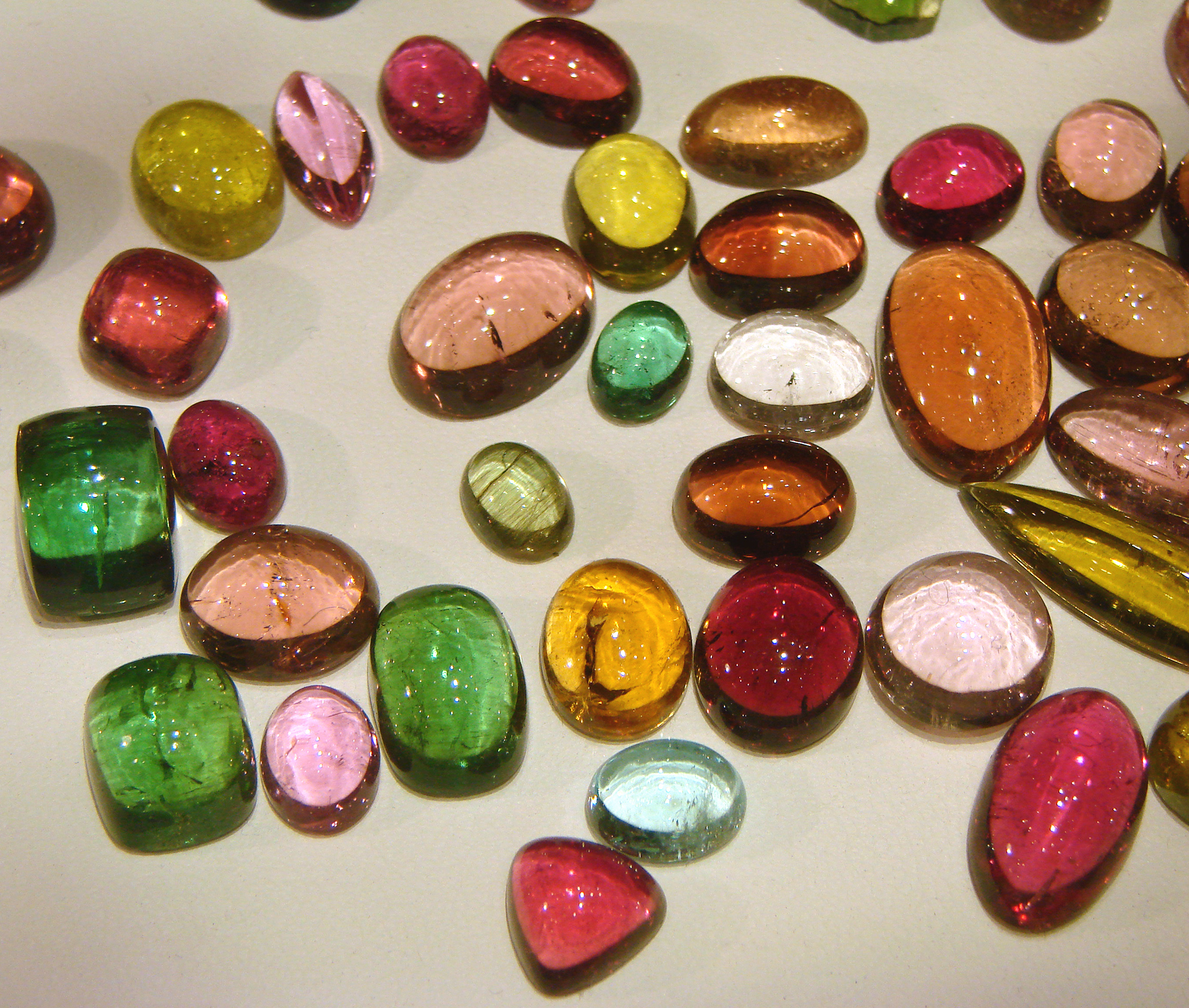 Cabochons de tourmaline de différentes couleurs.